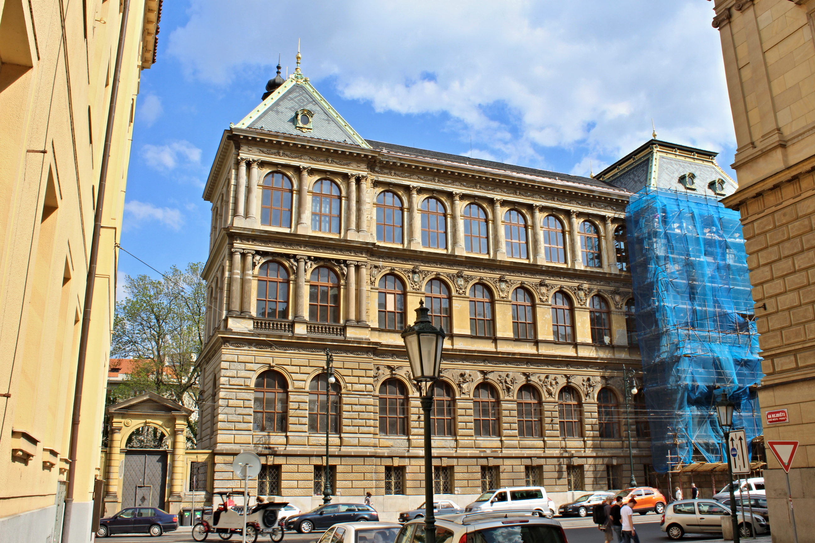 Uměleckoprůmyslové muzeum (Praha)